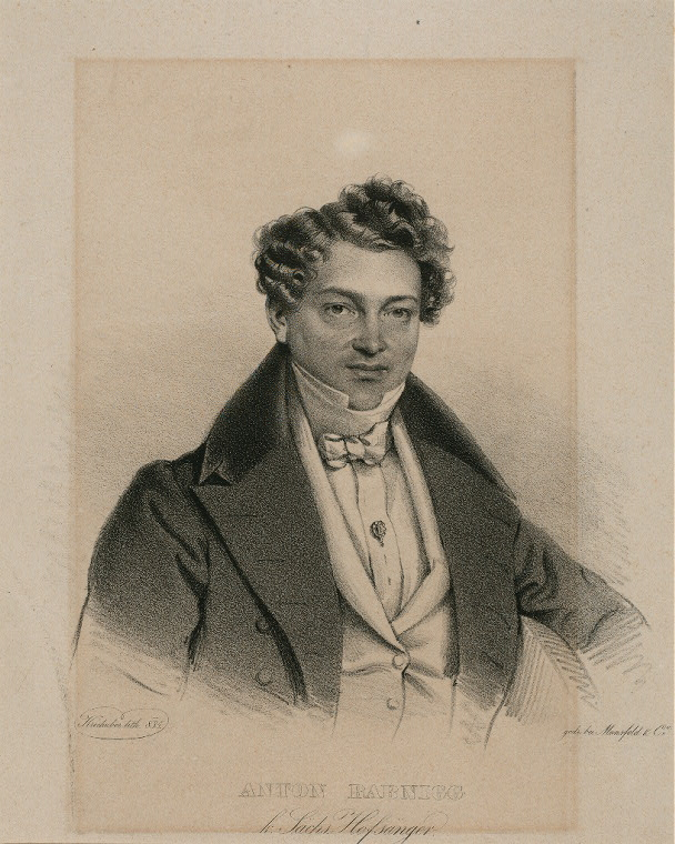 Anton Babnigg (1793–1872), österreichischer Schauspieler